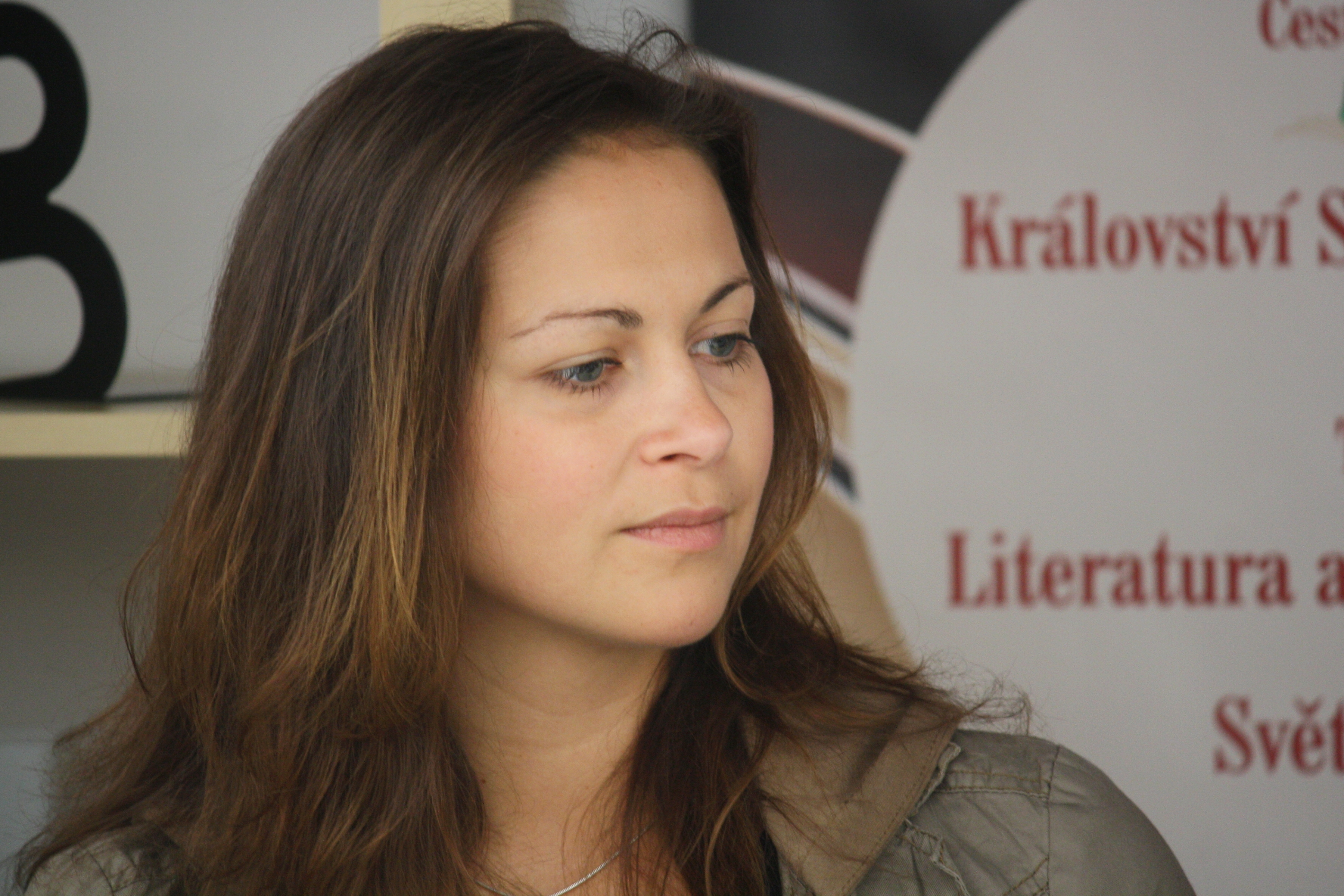 Kristýna Hrušínská na 17. mezinárodním knižním veletrhu Svět knihy v Praze Personality rights warning Although this work is freely licensed or in the public domain, the person(s) shown may have rights that legally restrict certain re-uses unless those depicted consent to such uses. In these cases, a model release or other evidence of consent could protect you from infringement claims.